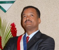 Photo du maire de la ville des Abymes